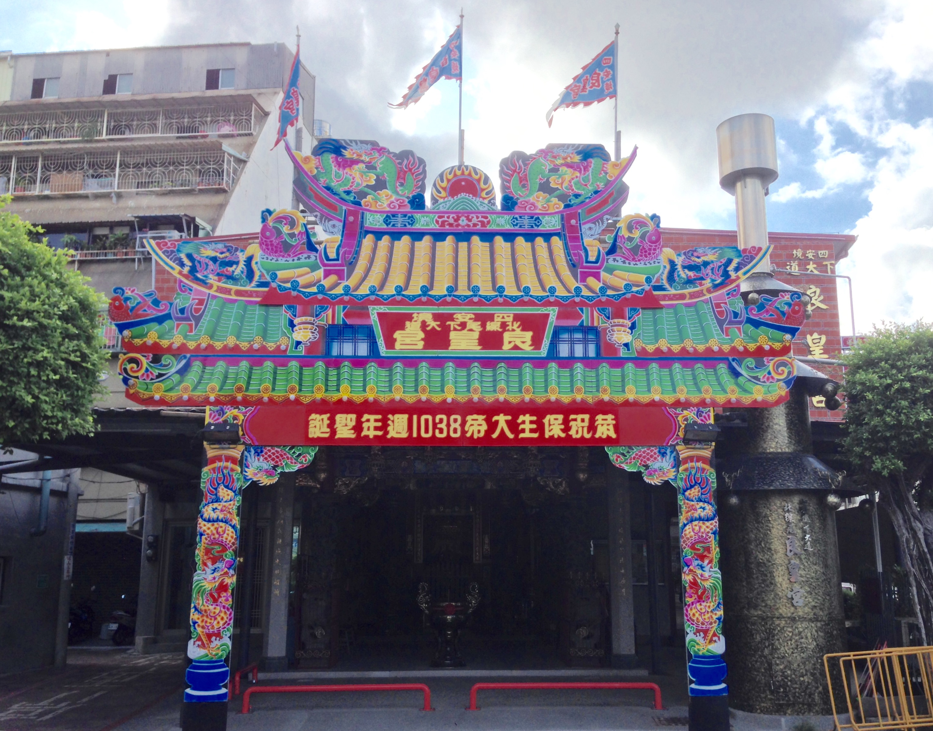 下大道良皇宮2016年外貌